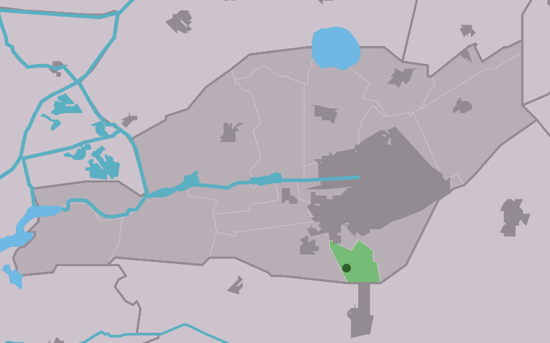 Kaartsje fan himrik fan Koartehimmen